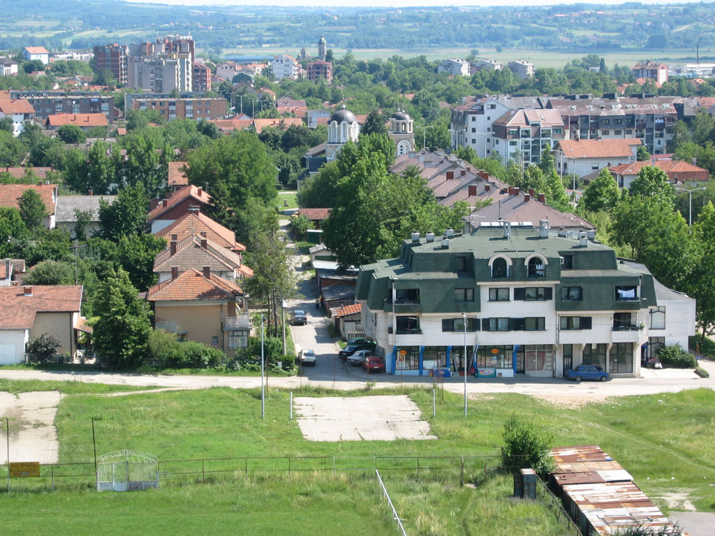 Поглед на Смедеревску Паланку